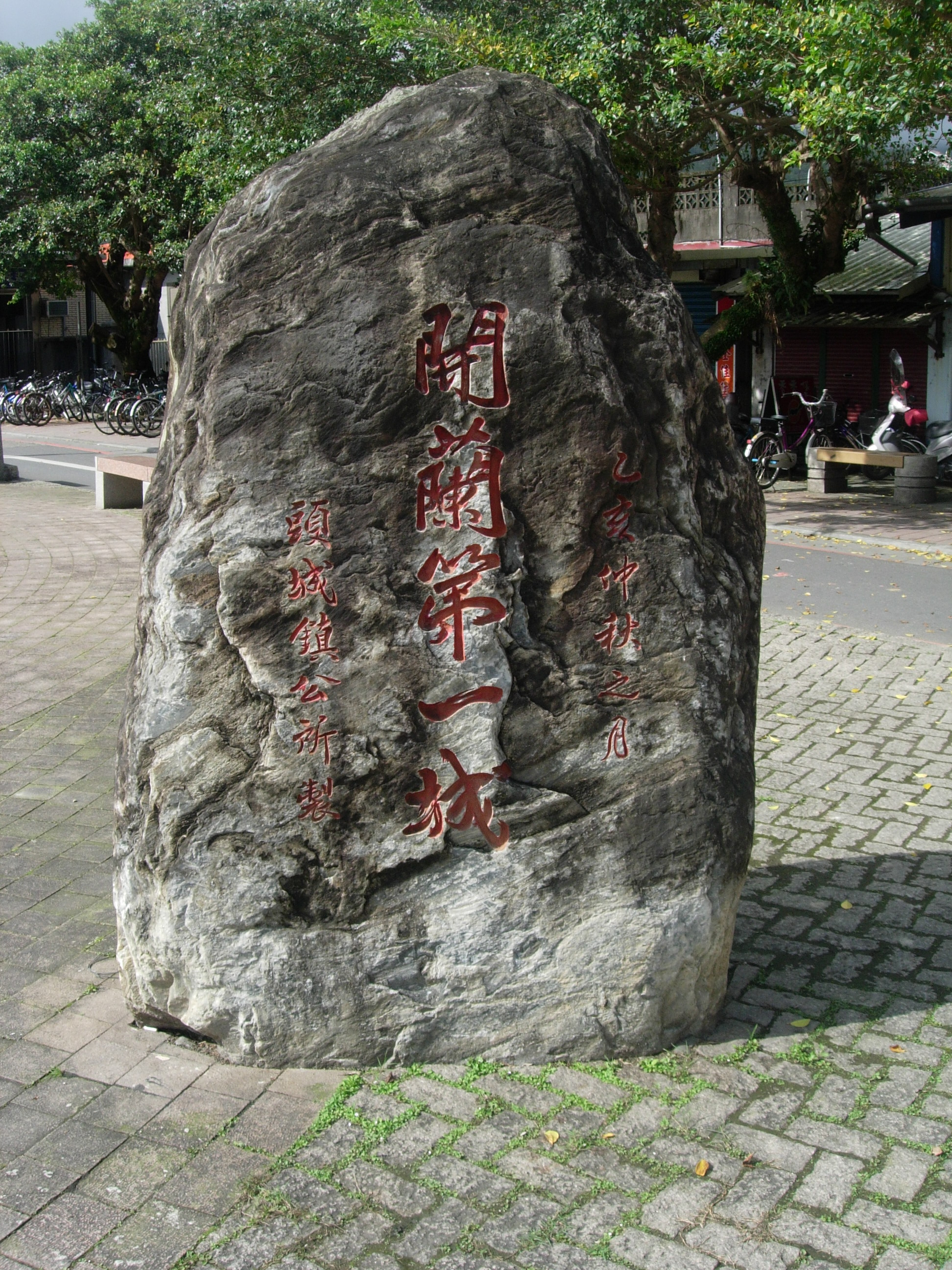 中文（台灣）: 臺灣鐵路管理局頭城車站前廣場「開蘭第一城」石刻。